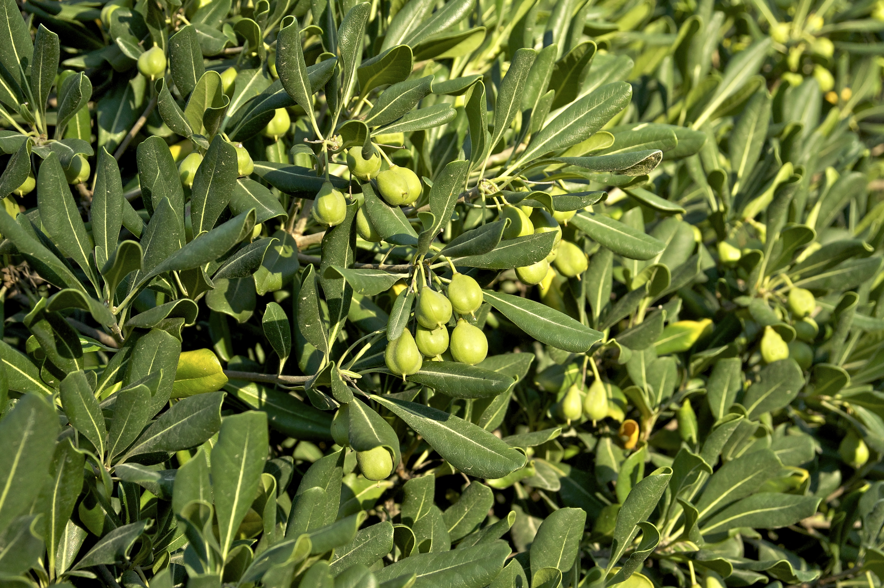 Pittosporum tobira (Thunb.) W.T. Aliton. Jardin des Plantes de Paris